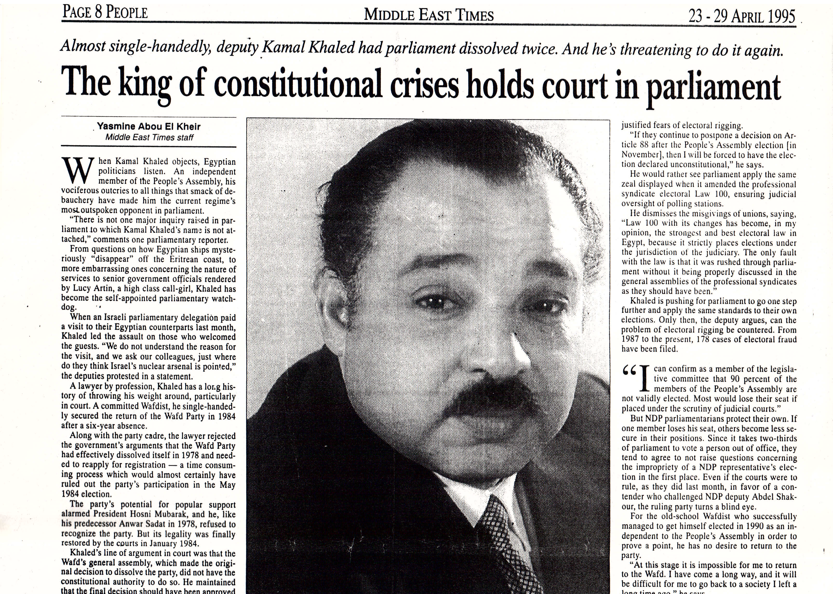 جريدة ميديل الايست تايمز